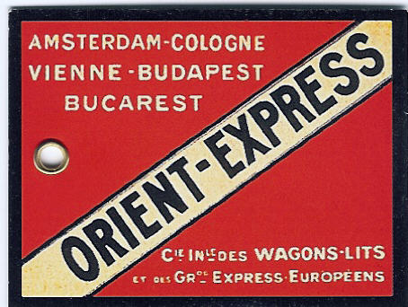 étiquette à bagage, archives CIWL, (c)wagons-lits diffusion, paris